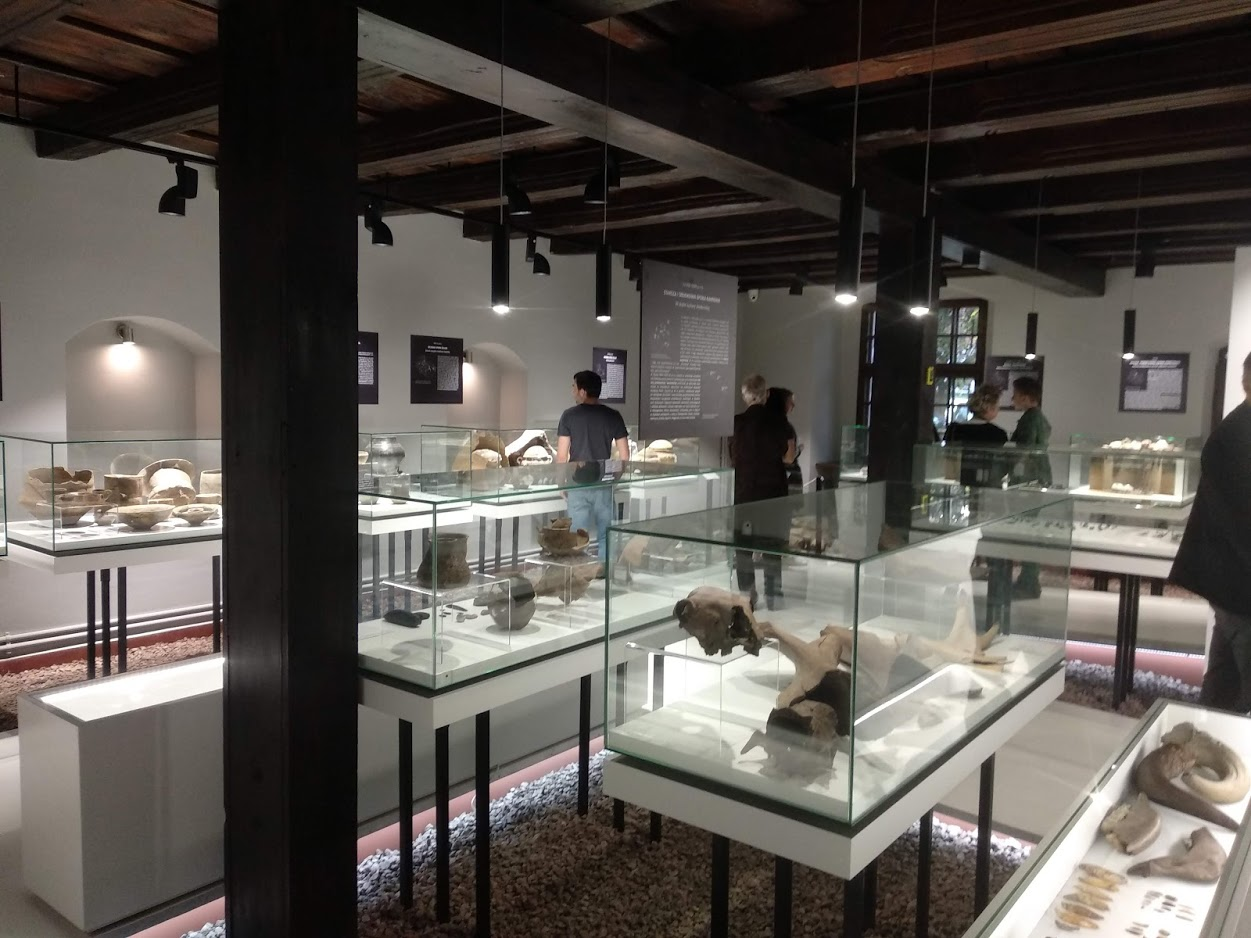 Muzeum Historii Włocławka (2019 r.)